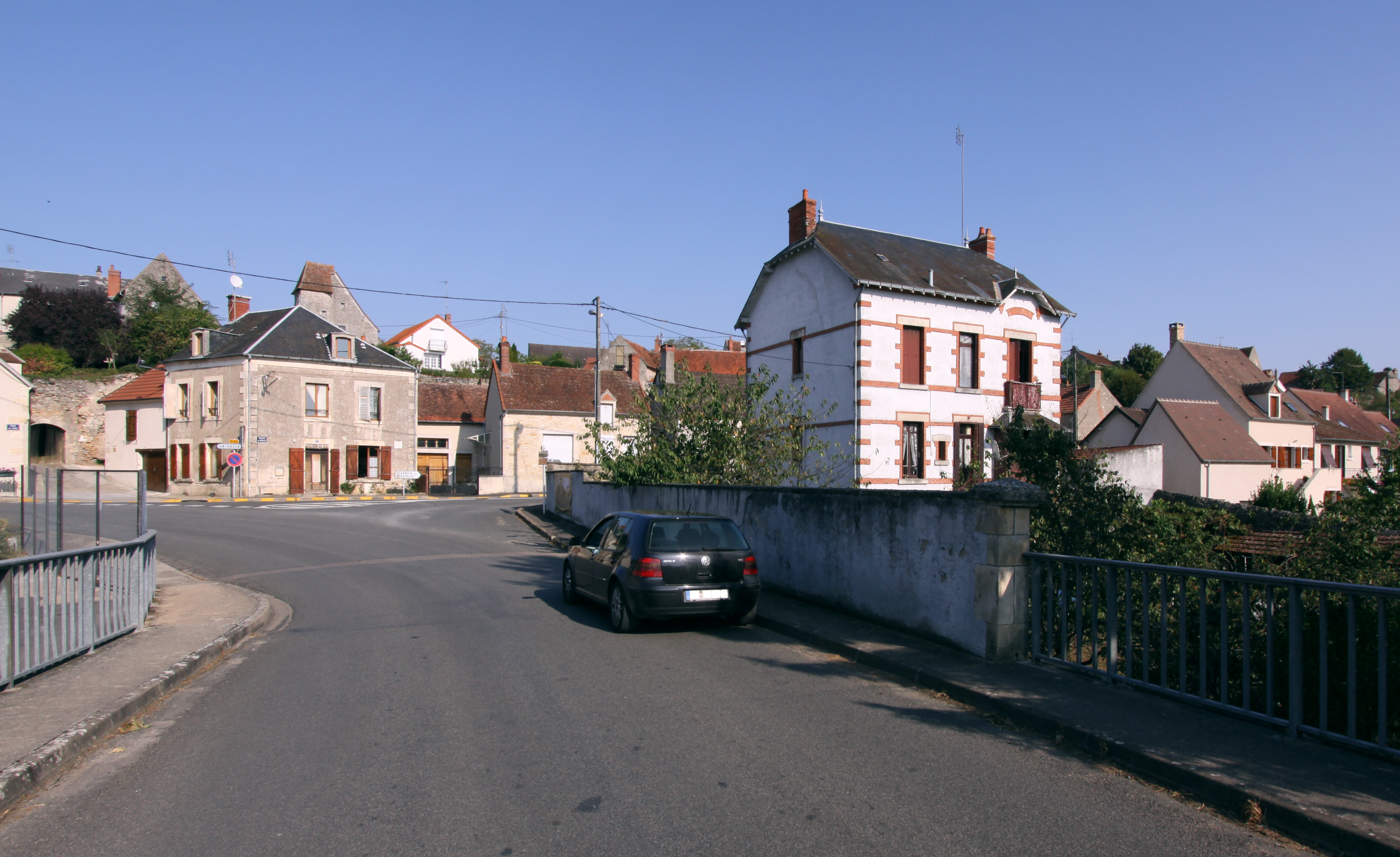 Die Ortschaft Bruère-Allichamps im französischen Département Cher liegt am gleichnamigen Fluss Cher - Ortseingang